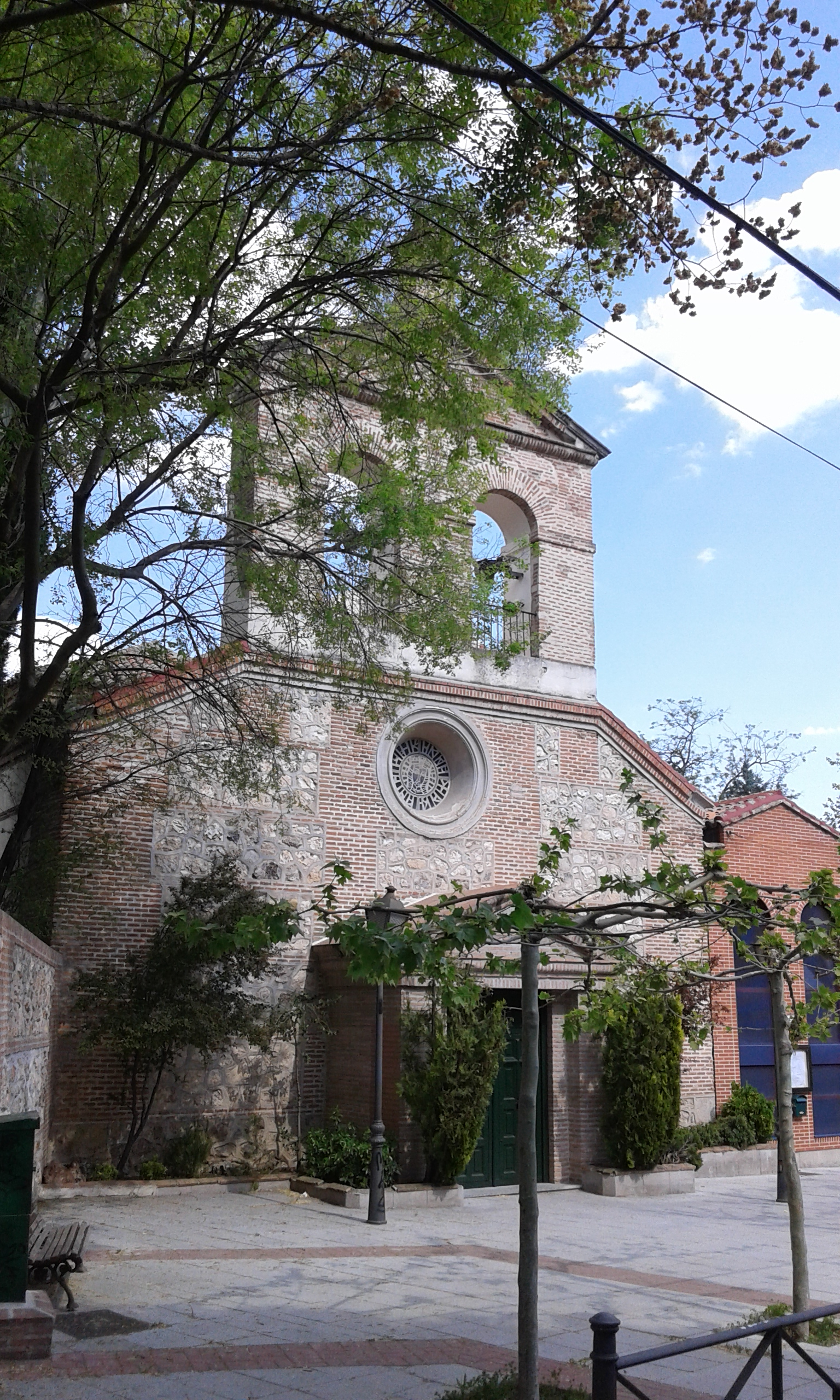 Antigua parroquia del pueblo de la Alameda